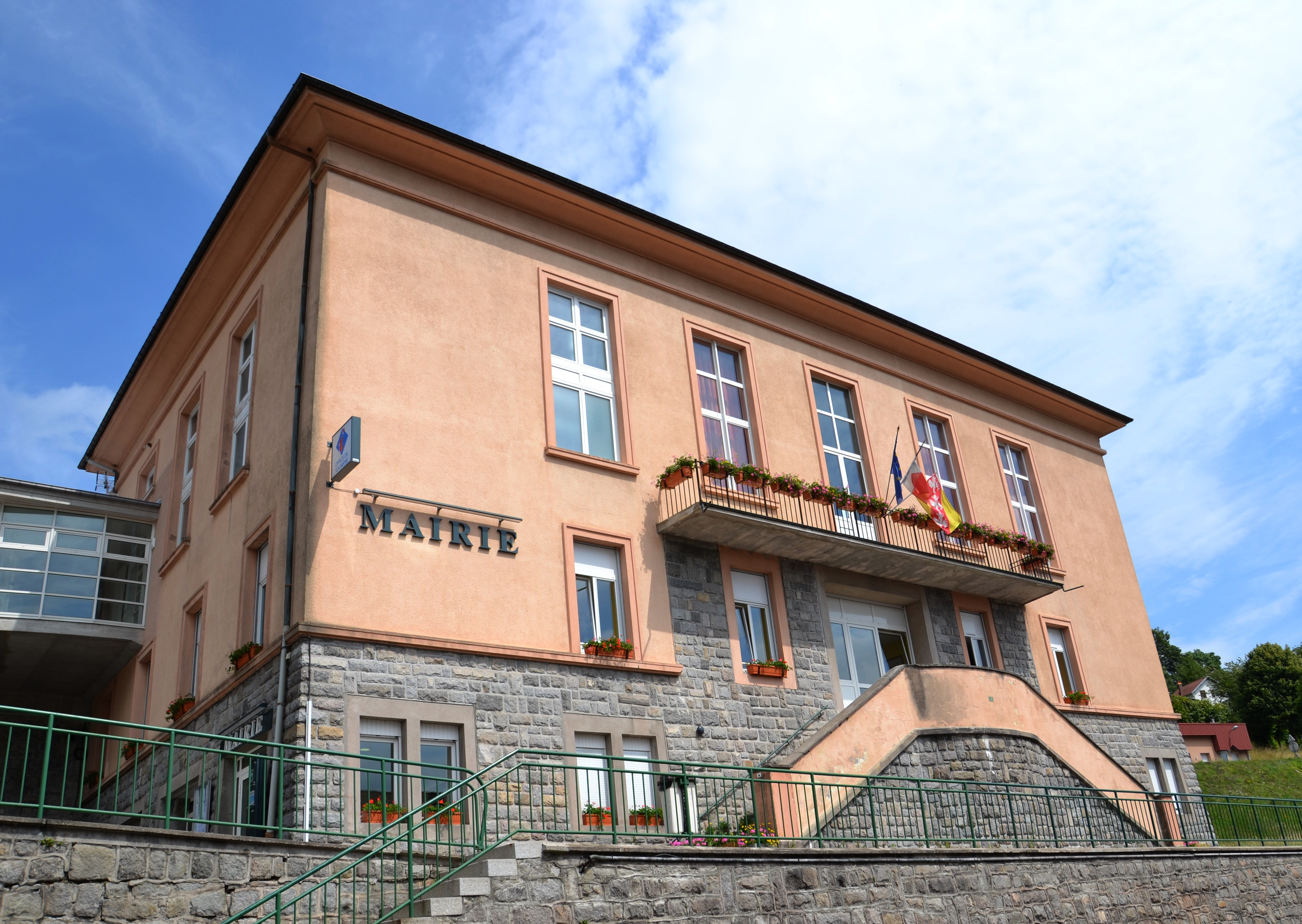 Mairie du Tholy, Vosges.